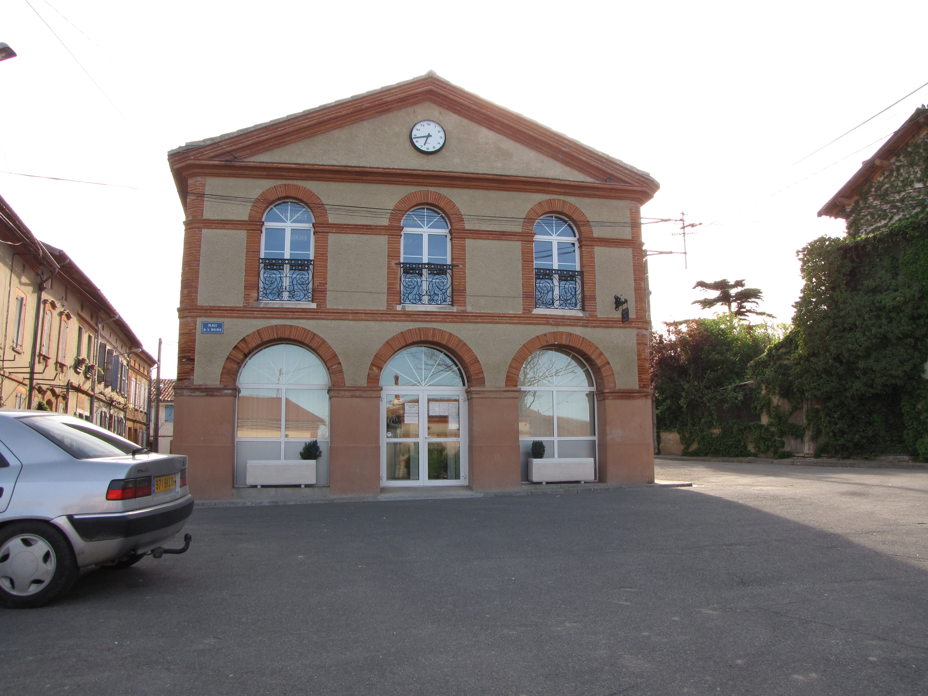 Mairie de Caujac (Haute-Garonne, France).